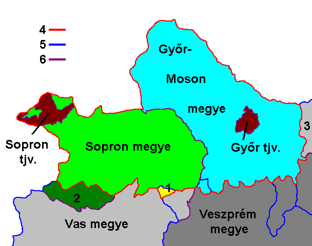 Győr-Sopron megye kialakítása 1950-ben. 1 Vas megyétől Győr-Sopronhoz, 2 Sopron megyétől Vashoz, 3 Komárom megye, 4 Győr-Sopron megye 1950-től, 5 mai megyehatár, 6 megszűnt 1949-es megyehatár